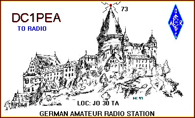 QSL-Karte